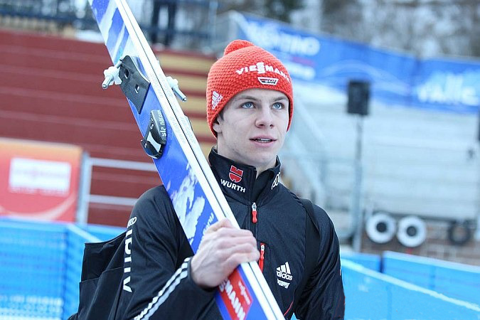 Oficjalne treningi mężczyzn na skoczni K-120 przed konkursem indywidualnym mężczyzn podczas Mistrzostw Świata w Narciarstwie Klasycznym 2013